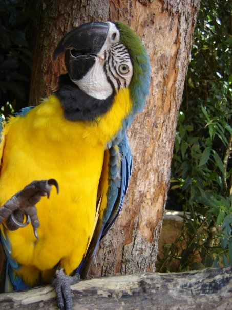 Ara ararauna